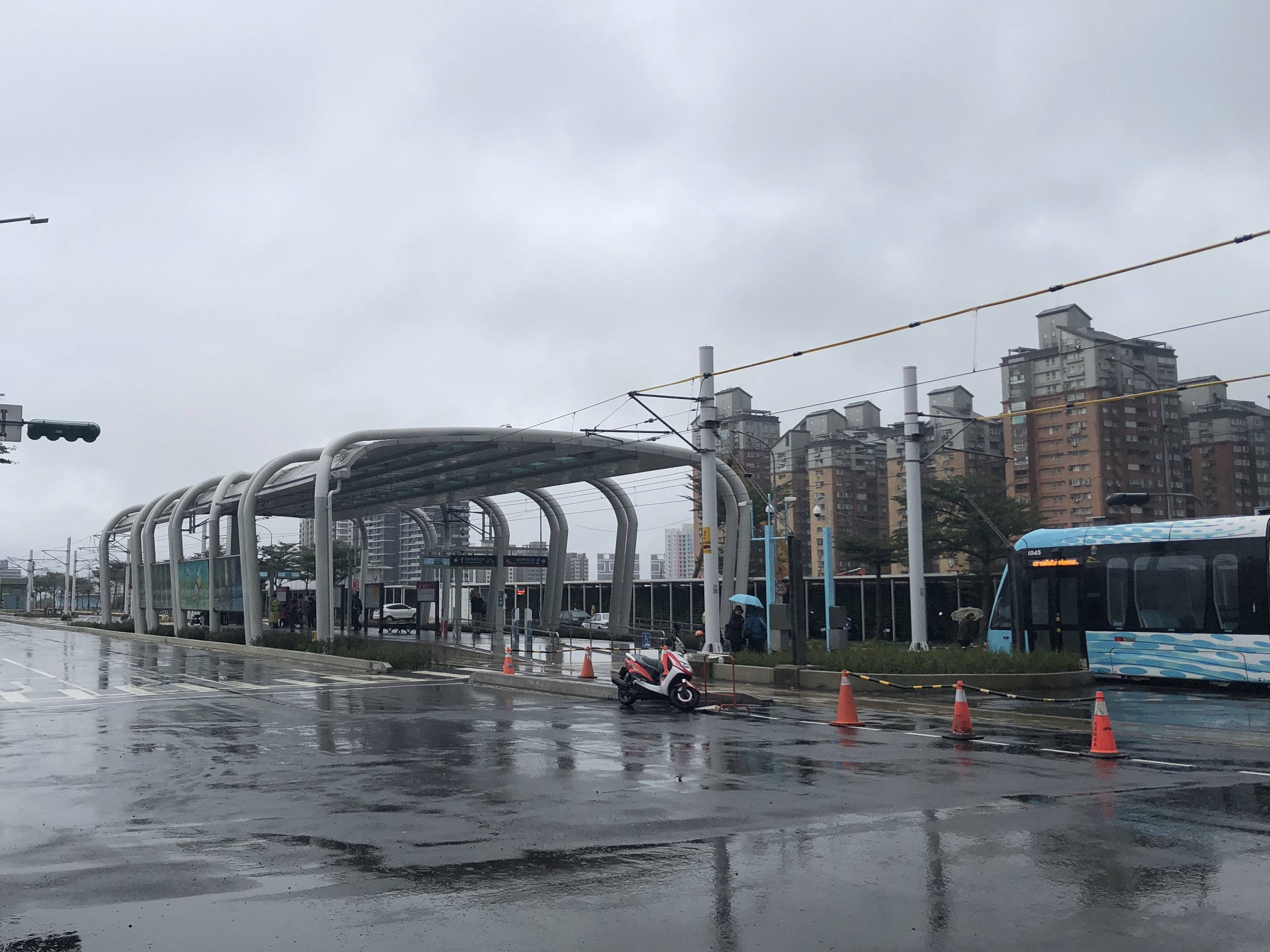 崁頂站